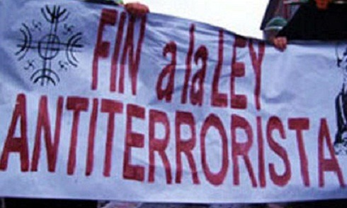 Organizaciones sociales, politicas y comunidades mapuche protestan contra la aplicacion de la ley antiterrorista a comunidades mapuche y juicio a Relmu Ñanco, Mauricio Ran y Martin Maliqueo,Zapala Neuquen